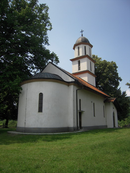 Hram_Blagovijesti_Presv._Bogorodice_(Šljivno)